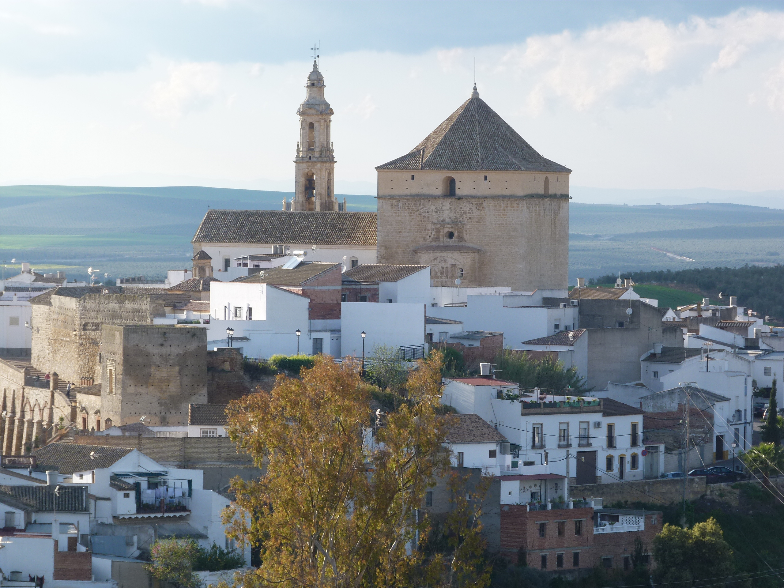 Iglesia de la Asunción y barrio de la Villa de Sanatella.